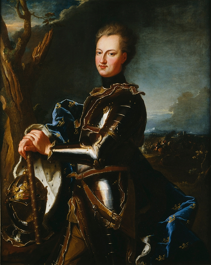 Karl XII var berömd i hela Europa. Alla ville ha hans porträtt. Det här har tillkommit i den franske hovmålaren Rigauds ateljé. I skinande rustning och med fladdrande mantel står kungen uppställd som på en teaterscen – kriget i bakgrunden liknar mest en kuliss. Det korta håret hade blivit hans signum, en symbol för soldatkungen. 1715, när porträttet målades, var den svenska stormakten på väg att falla samman. Verkliga krig, mycket blodigare än målningens teaterkrig, rasade på alla håll. Tre år senare var kungen död.